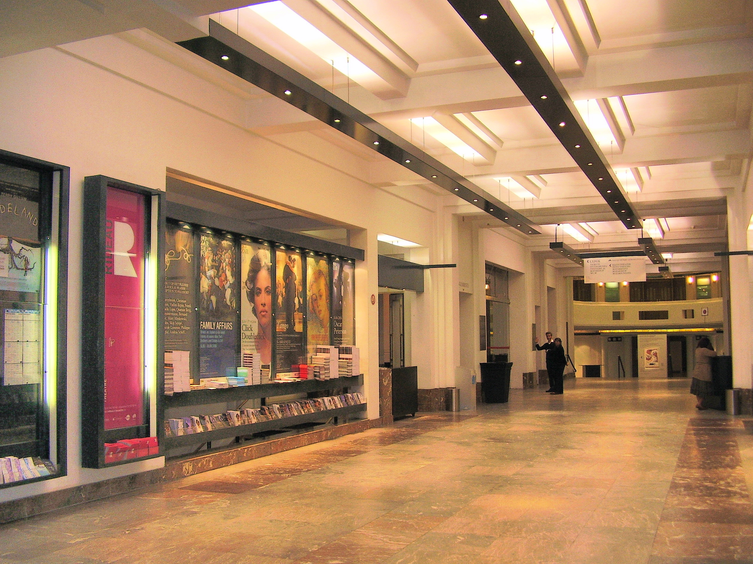 Description: Palais des Beaux-Arts de Bruxelles (1922-1929), vestibule, architecte Victor Horta Author: User:Ben2 Date of creation: 15 juin 2006 Source: Travail personnel (selfmade)